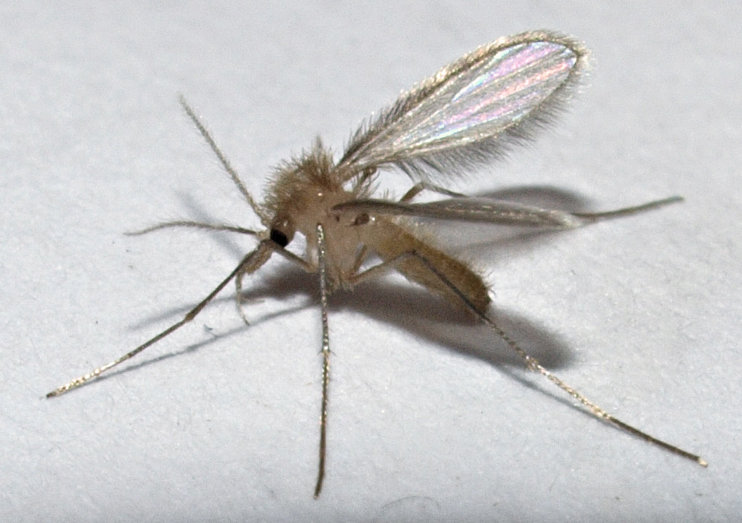 Phlebotomus sp. Losar de la Vera (Cáceres, España).